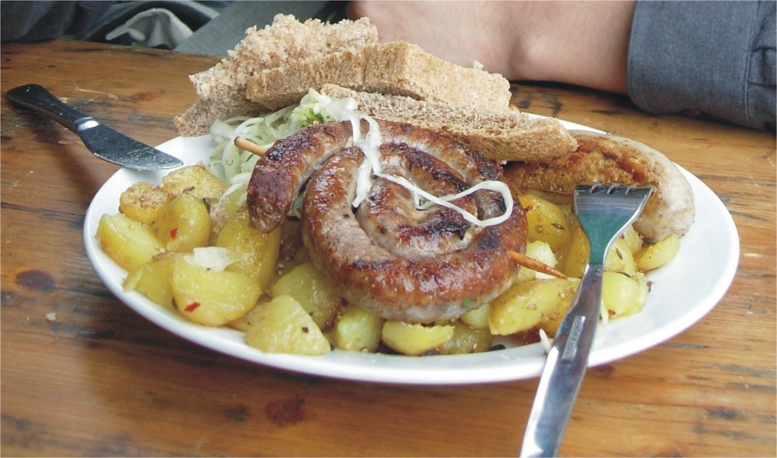 明斯特（Münster）路邊攤所販售的德國油煎香腸（Bratwurst）